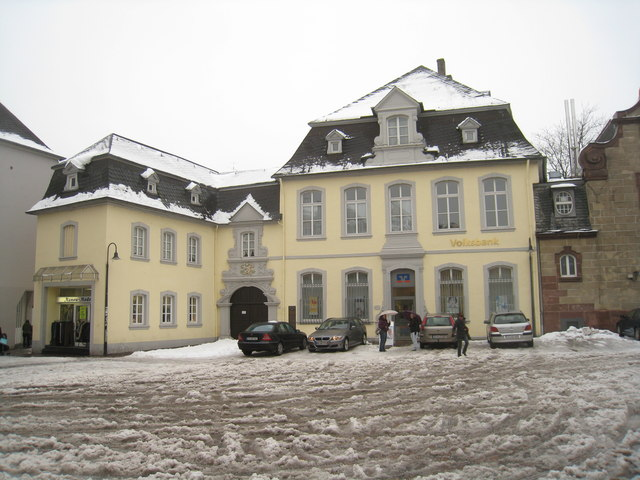 Volksbank